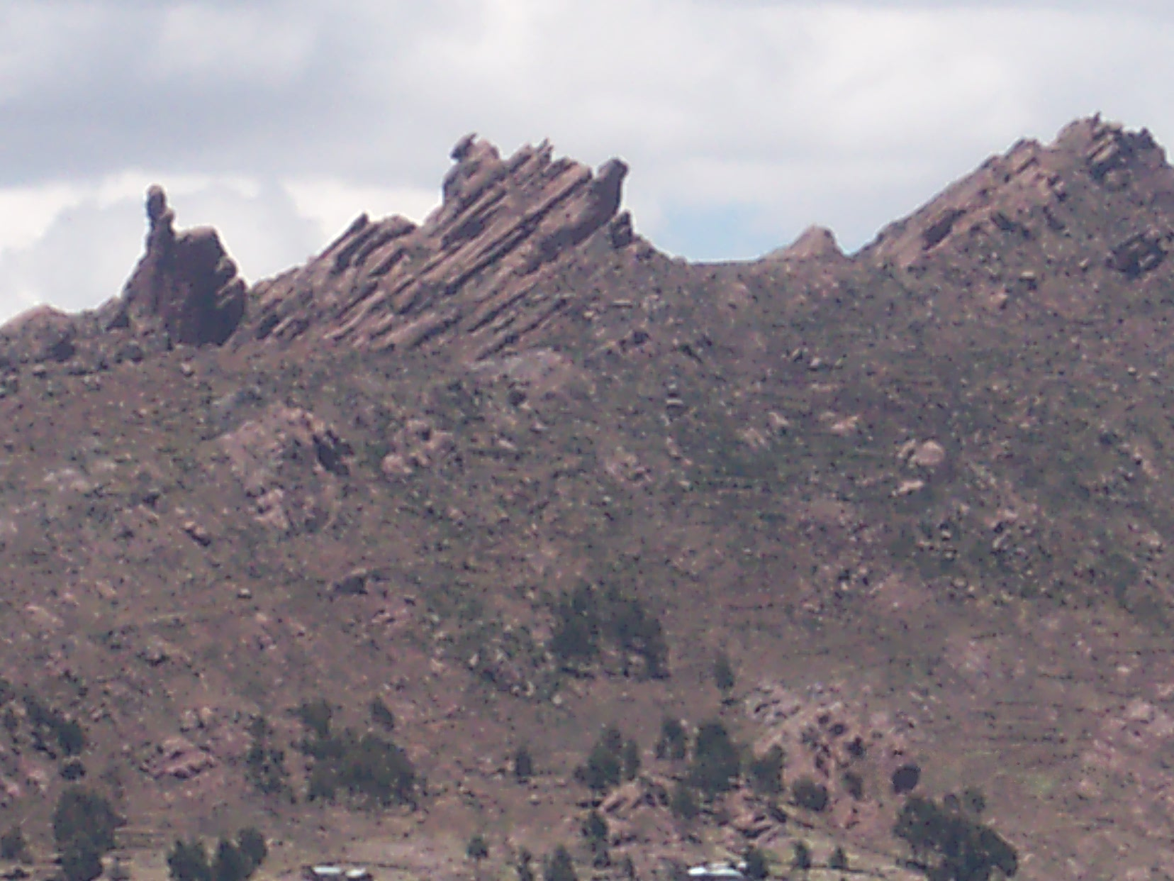 Alrededores de Puno. Ejemplo de erosión eólica